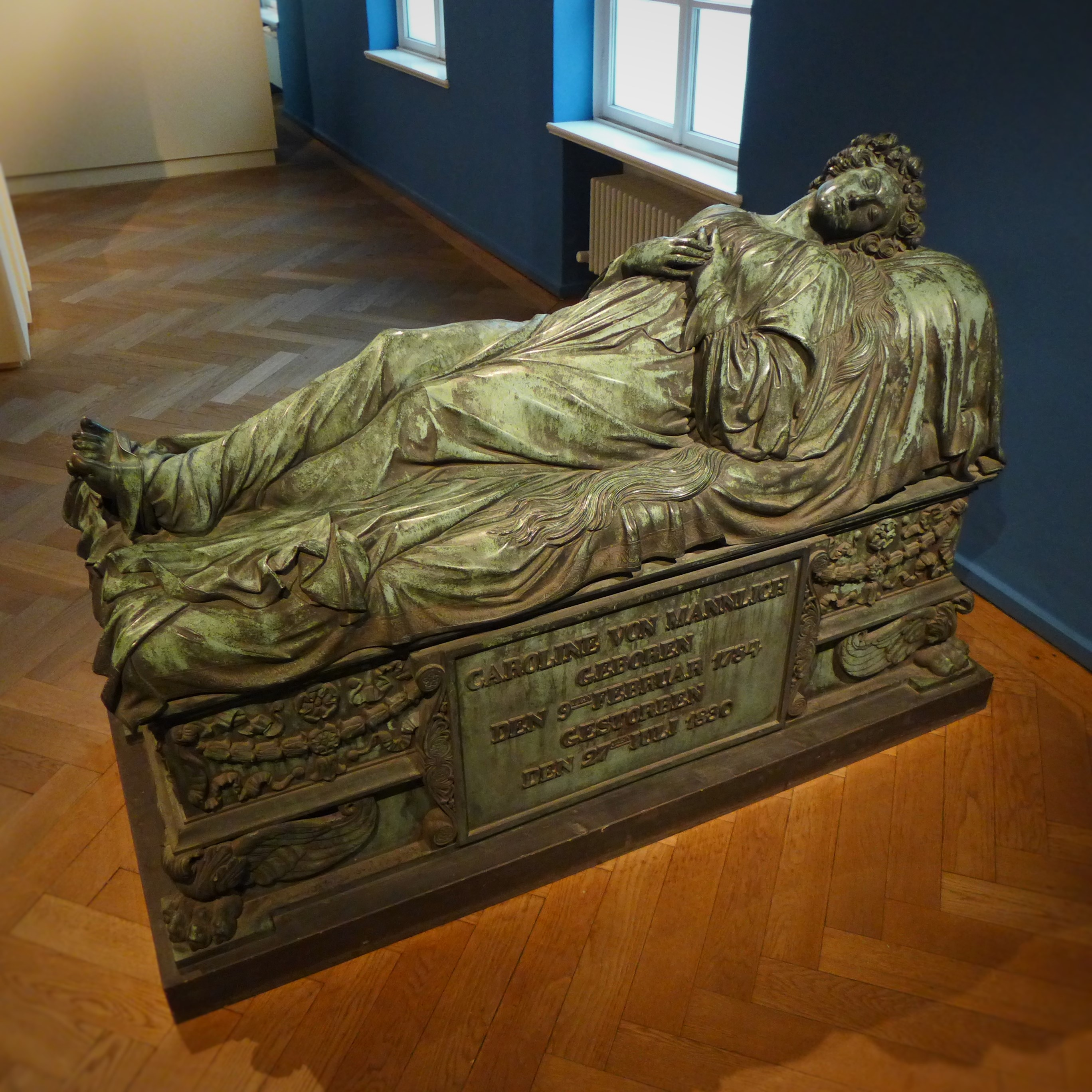 Johann Baptist Stiglmaier (1791-1844) mit Unterstützung von Christian Daniel Rauch (1777-1857): Grabmal der Caroline von Mannlich (9. Februar 1784 - 27. Juli 1830), Tochter von Johann Christian von Mannlich (1741-1822), Caroline von Mannlich führte als ledige Tochter den Haushalt ihres Vaters, Das bronzene Grabmal gehörte zu den bedeutendsten Monumenten des alten Münchener Südfriedhofes